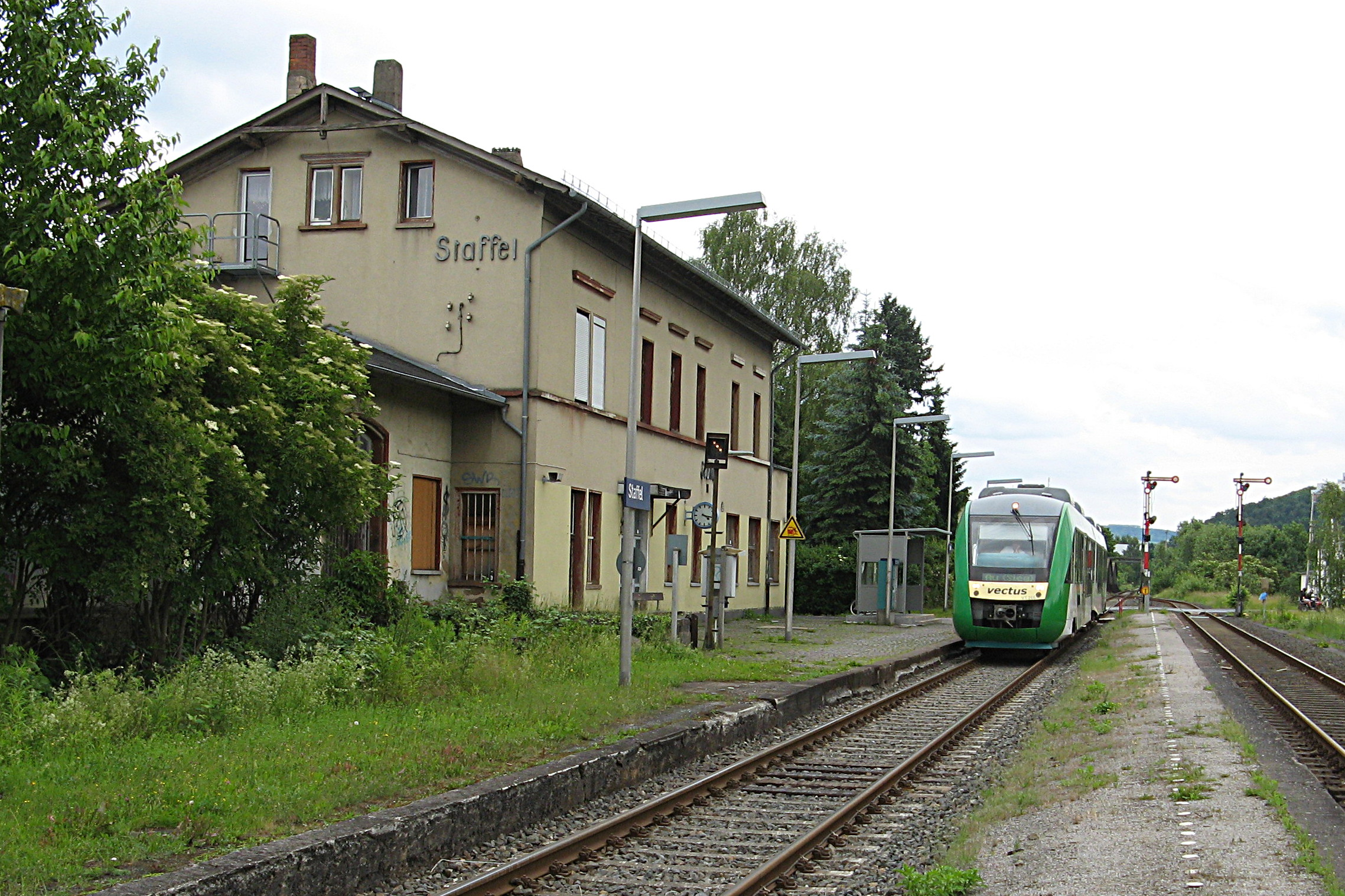 Bahnhof Staffel von der Gleisseite mit Zug nach Au (Sieg)